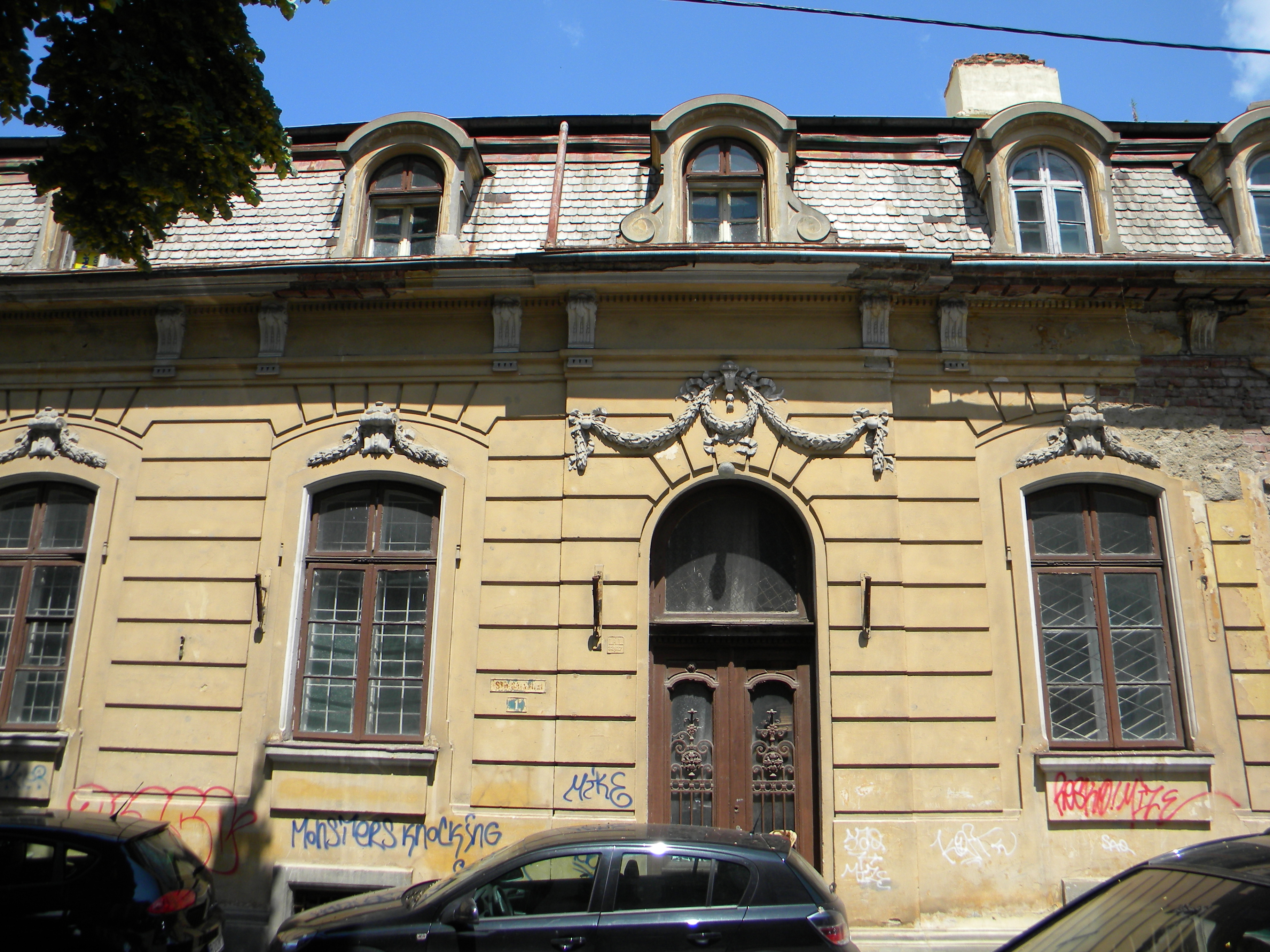 Bucuresti, Romania, Str. Caimatei nr. 1, sect. 2, B-II-m-B-18265